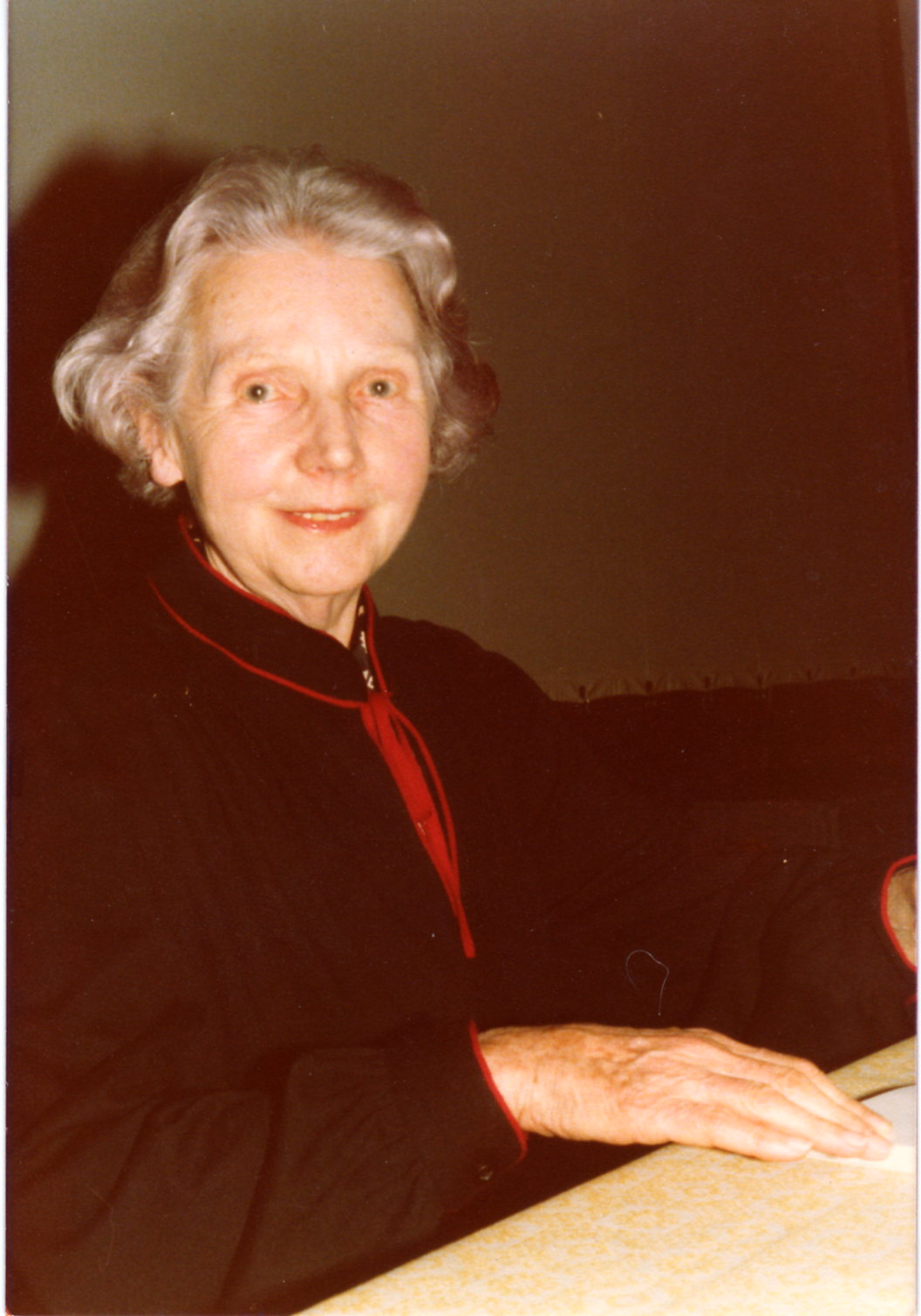 Maria Meinen an einer Dichterlesung in Zürich